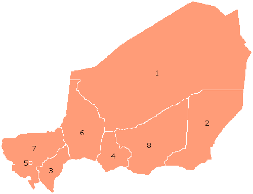 Kaart departementen van Niger - gemaakt door WHB